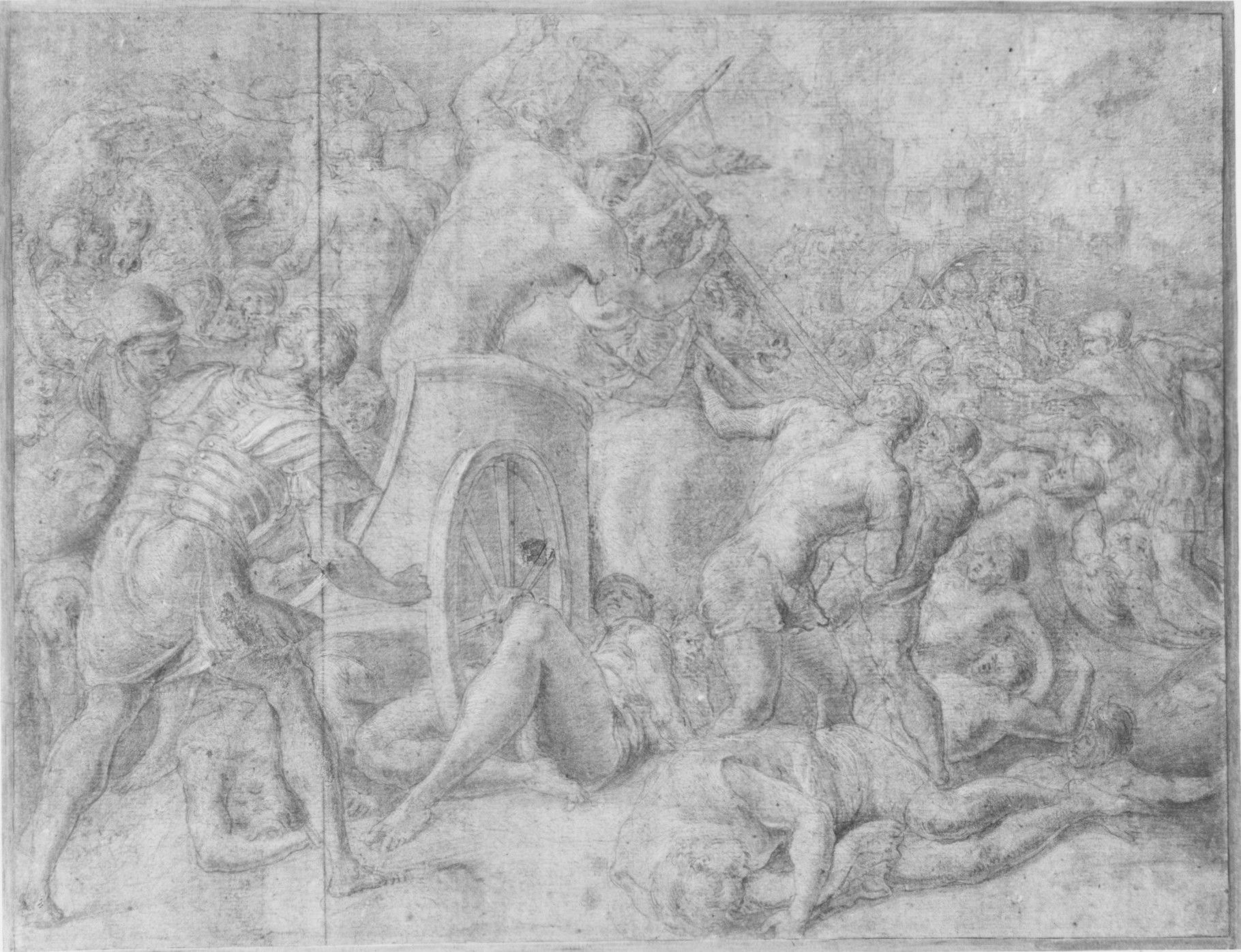 Drawing; Drawings